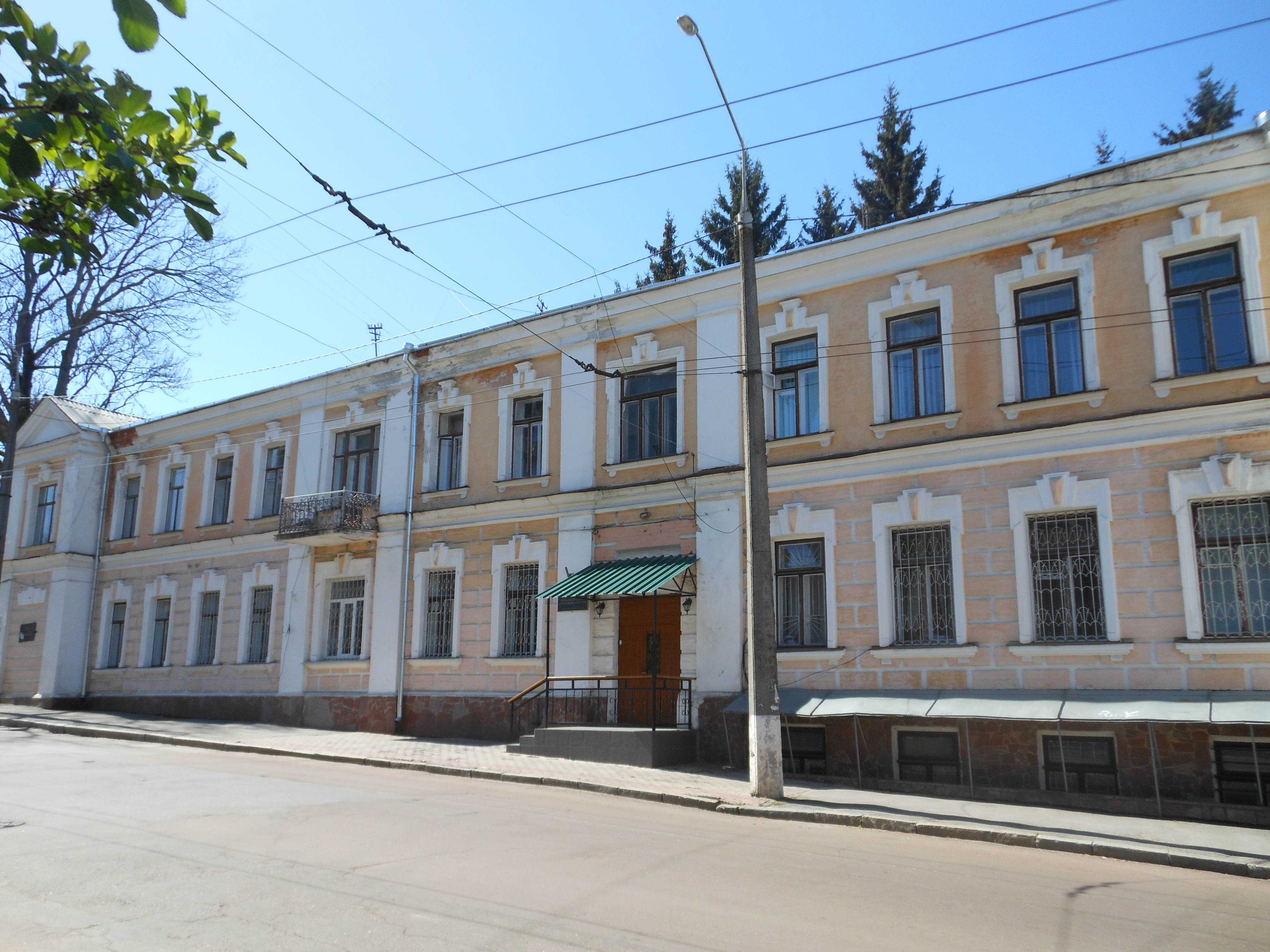 Будинок Щастних, Житомир, вул. Адмірала Щастного, 20